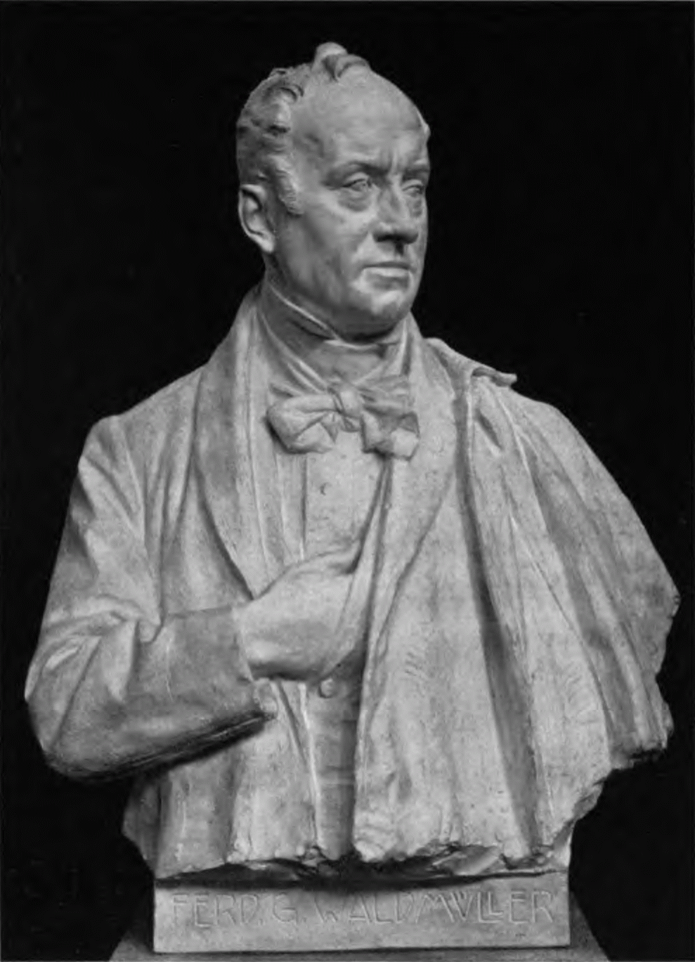 Ferdinand Georg Waldmüller (1793-1865), Austrian painter